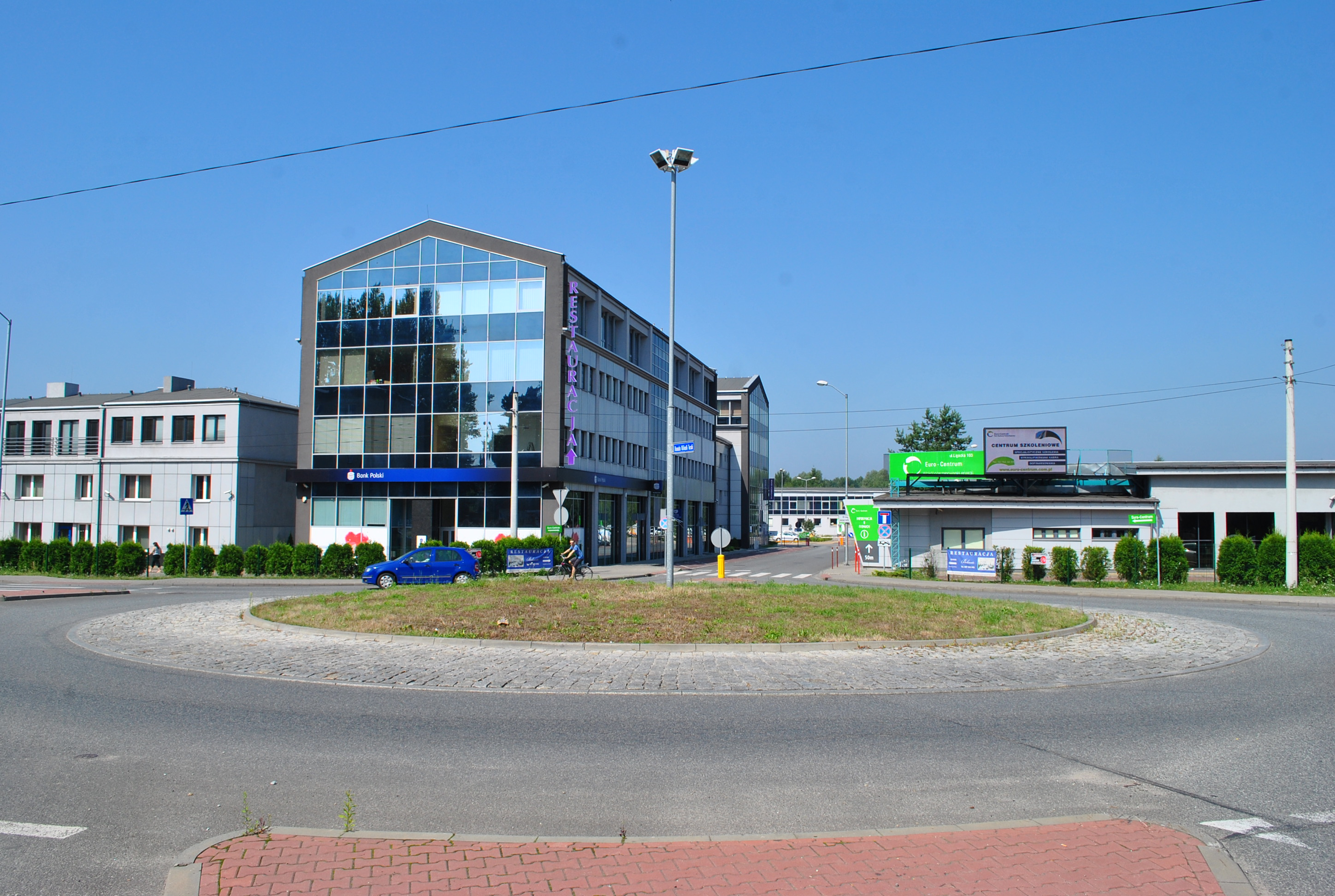 Katowice - Brynów. Rondo Nikoli Tesli u zbiegu ul. Załęskiej i ul. Ligockiej